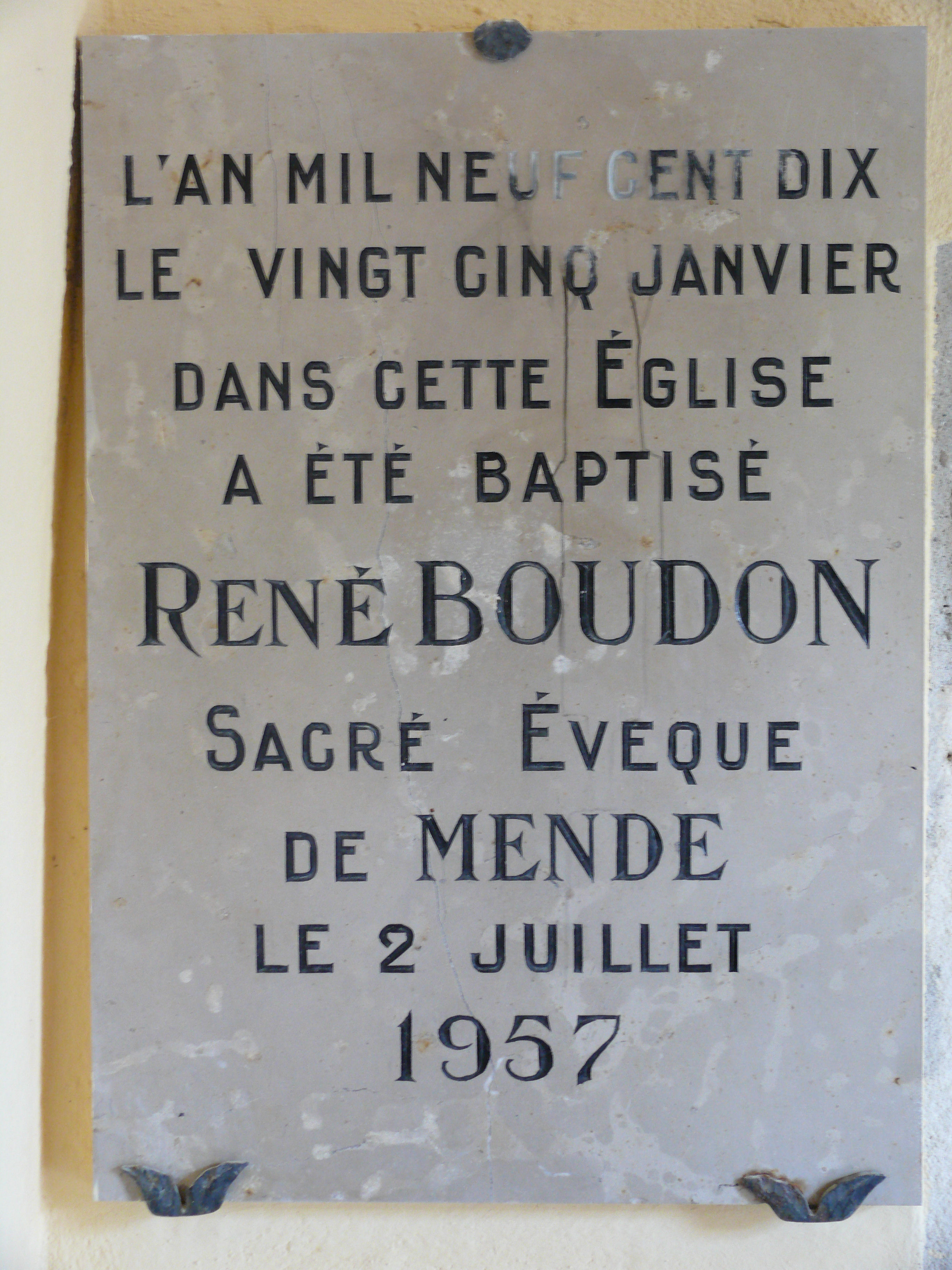 Montbrun (Lozère) - Plaque commémorative dans l'église